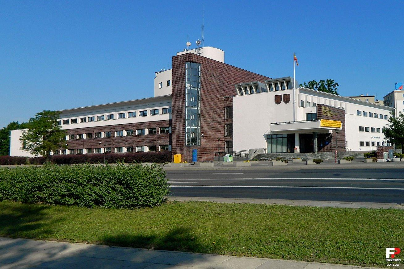 Ratusz dzielnicy Białołęka m. stoł. Warszawy